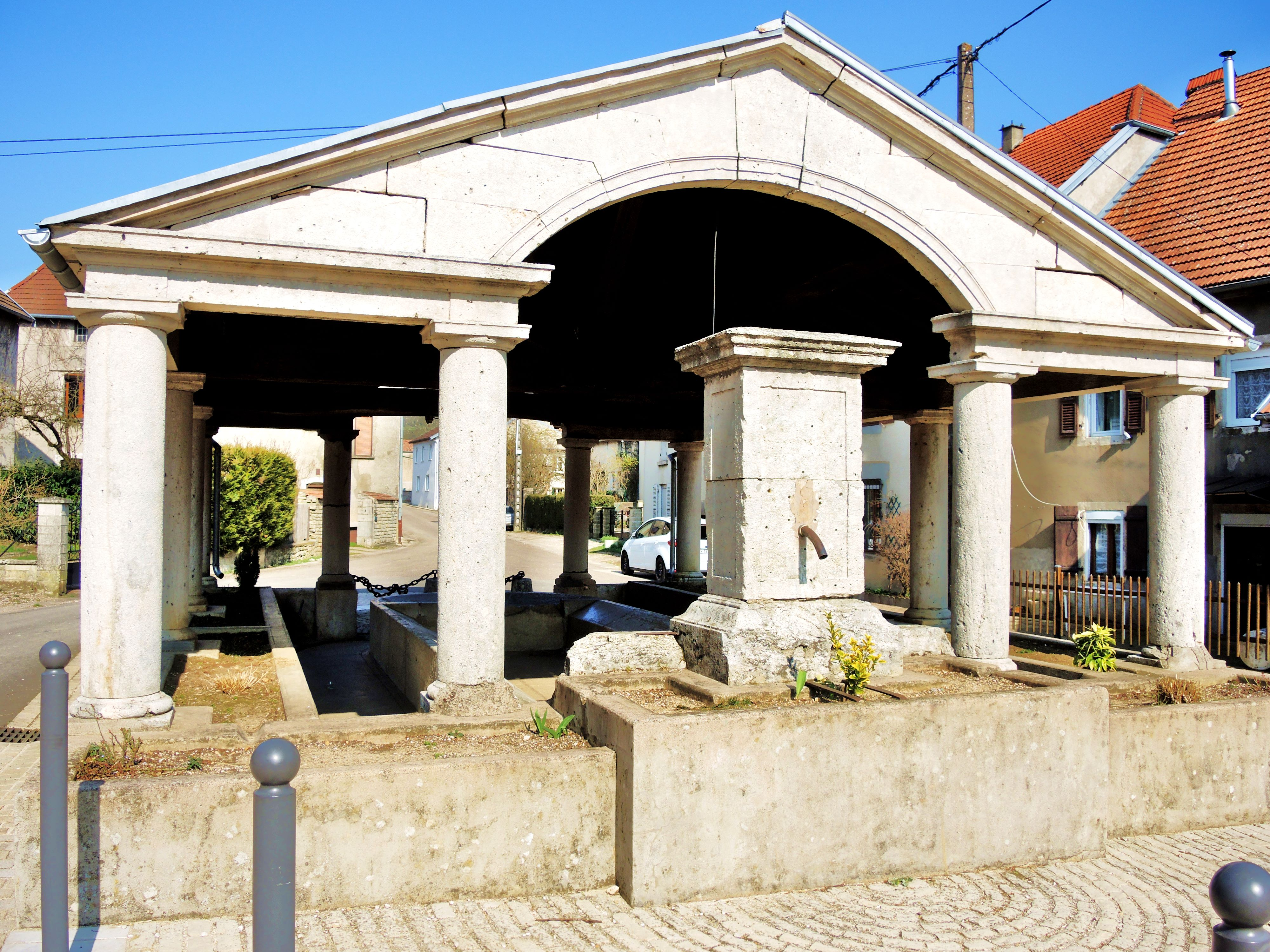 Façade de la fontaine-lavoir du village d'Oiselay.